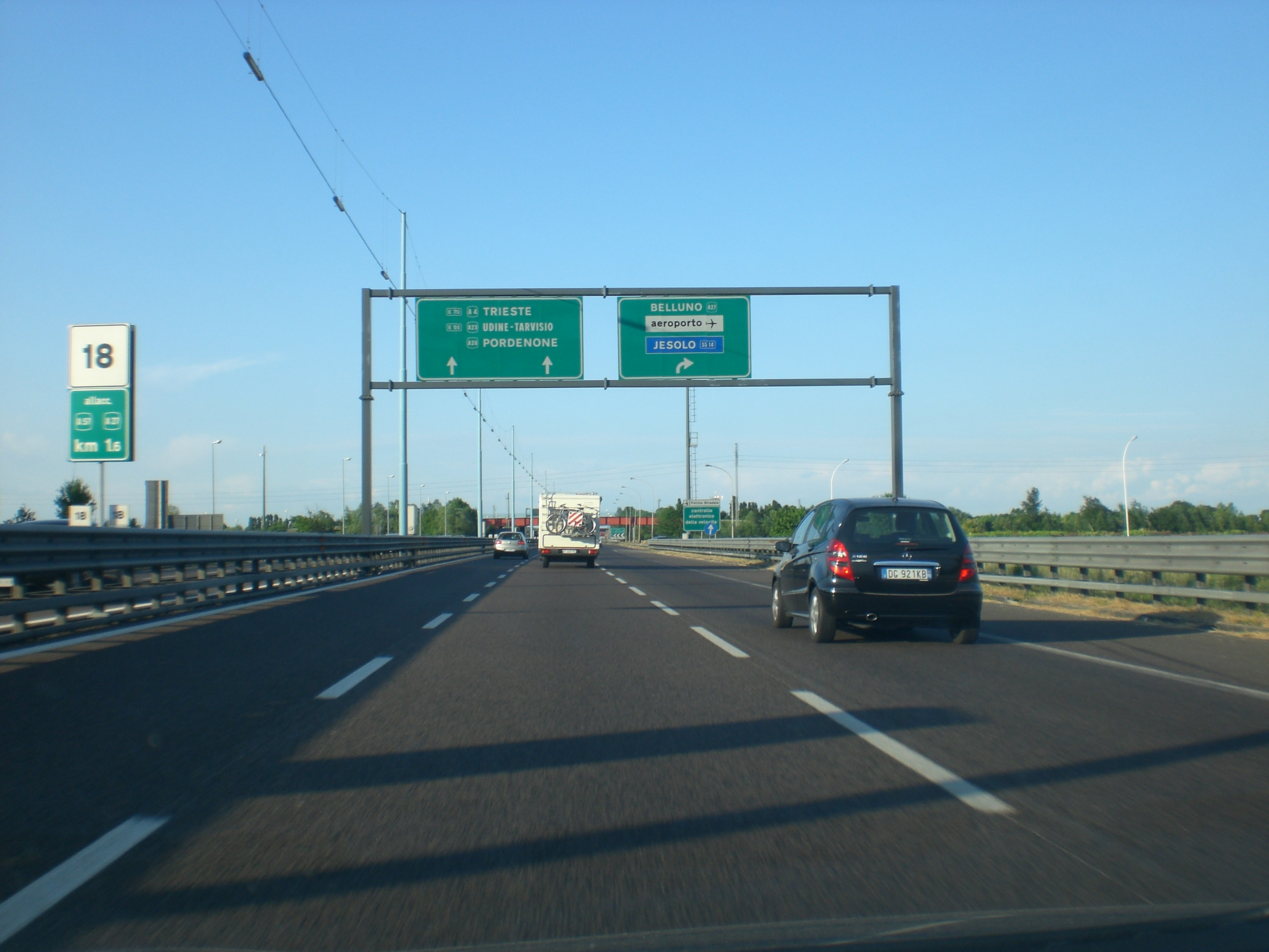 Svincolo per l'A27 direzione est dell'A57